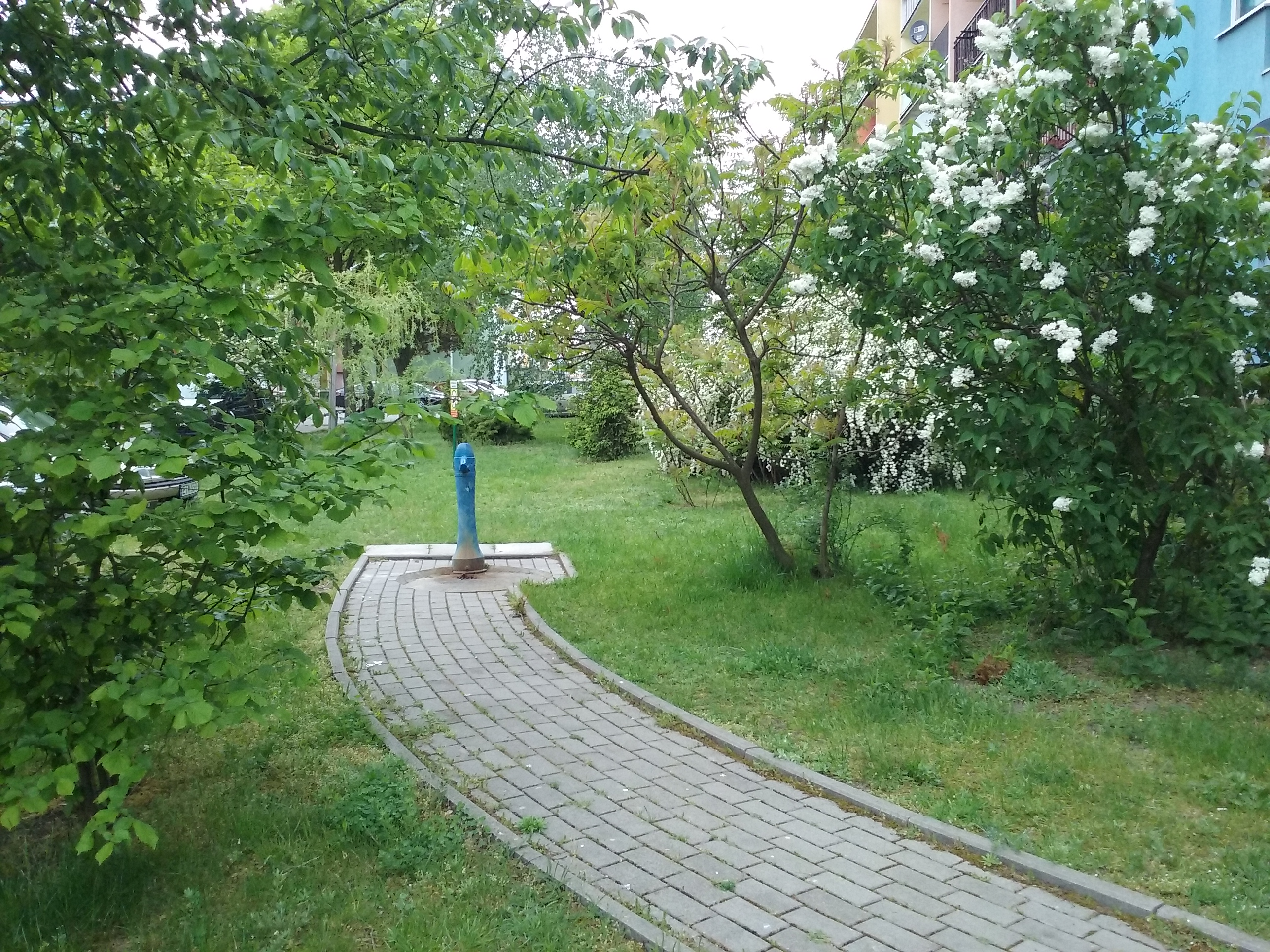 Stacja głębinowa przy ul. Sikorskiego w Tomaszowie Mazowieckim, PL, EU. CC0